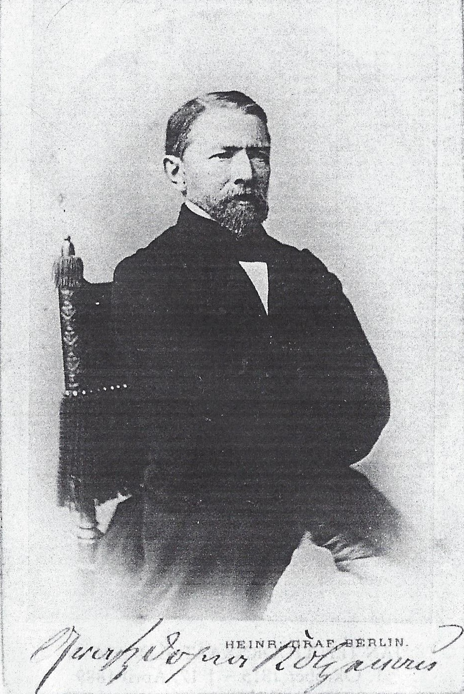 Porträtfotografie von Graf Wilhelm zu Dohna-Kotzenau (1809-1872)